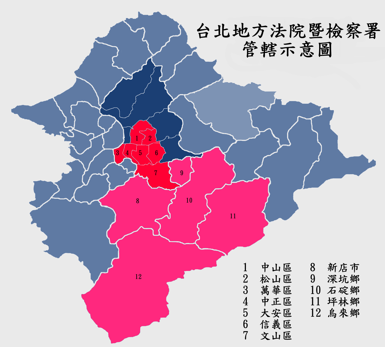 臺北地院管轄圖